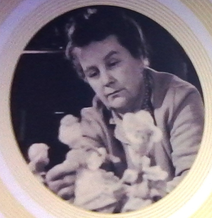 Filmový uzel Zlín, zábavní park, Filmová 689, Zlín-Kudlov.